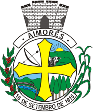 Brasão do município de Aimorés-MG